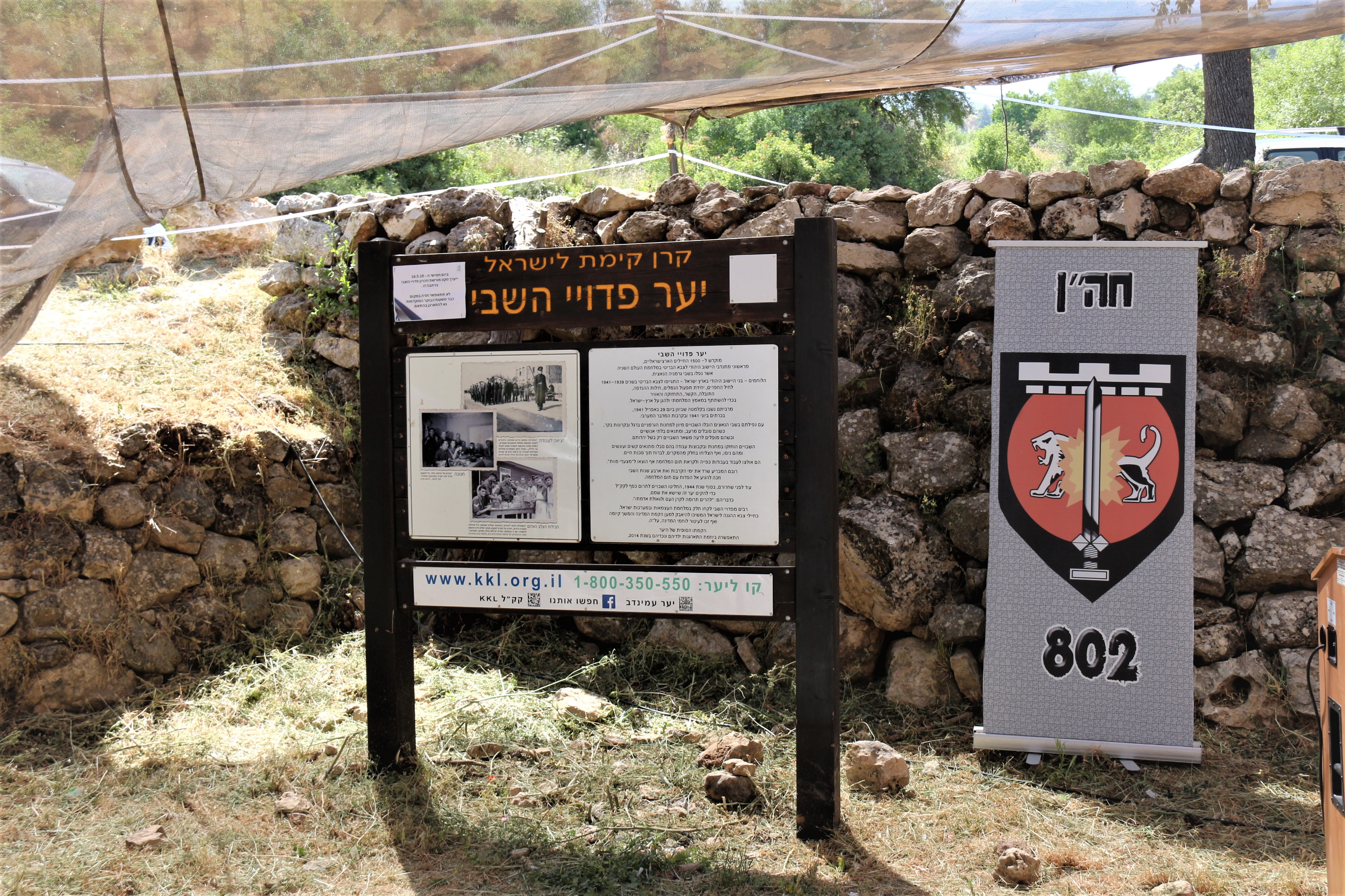 הכניסה ל"יער פדויי השבי" שניטע ע"י הקרן הקיימת לישראל במימון כספם של שבויי חיל החפרים ויחידות אחרות, מתנדבי היישוב הארצישראלי לצבא הבריטי במלחמת העולם השניה, שנתרם עוד במהלך שביים. היער נחנך ב-29.4.2015 במלאת 74 שנים לנפילתם בשבי הנאצי במערכה על יוון אפריל 1941.